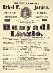 A Hunyadi László ősbemutatójának plakátja.